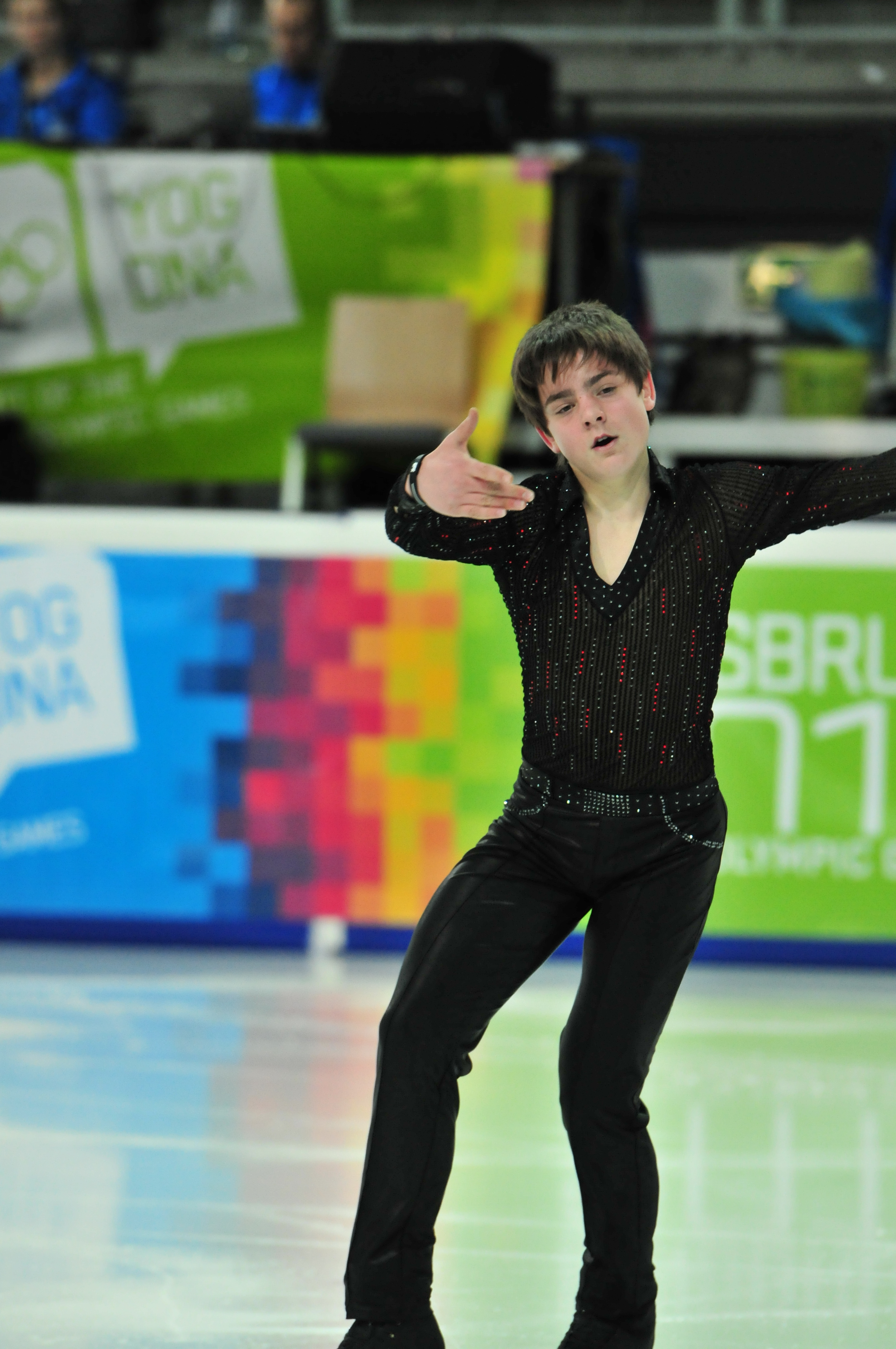 1. Jugendolympiade 2012 Innsbruck